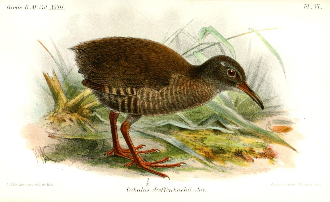 juvenile Cabalus dieffenbachii (=Gallirallus dieffenbachii)